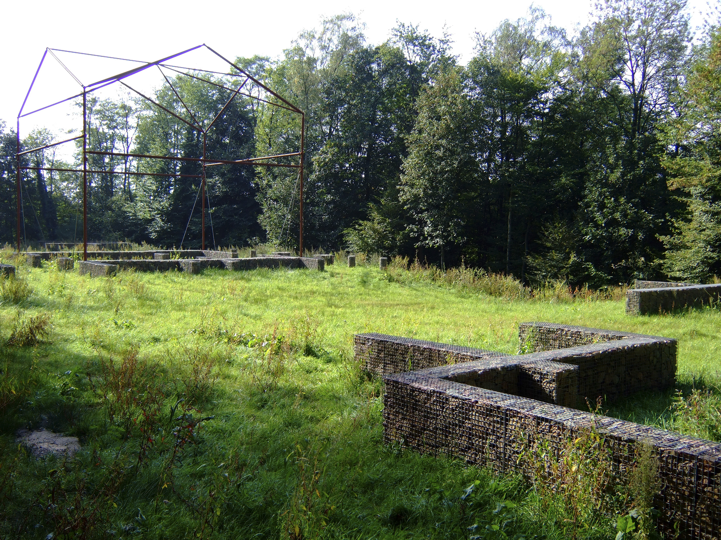 Archeologie/ Romeinse bouwkunst: Overzicht van visualisatie van Romeinse villa gelegen in het natuurgebied de Sint Jansberg, Archeoregio 5 (opmerking: Publicatie Uit Balans 2006)